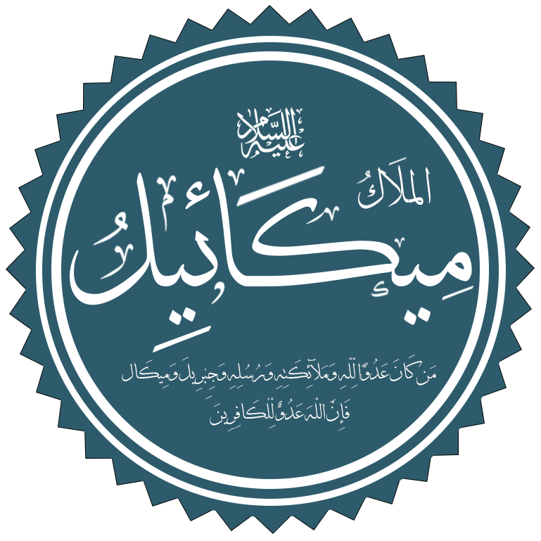 تخطيط لاسم الملاك ميكائيل عليه السلام